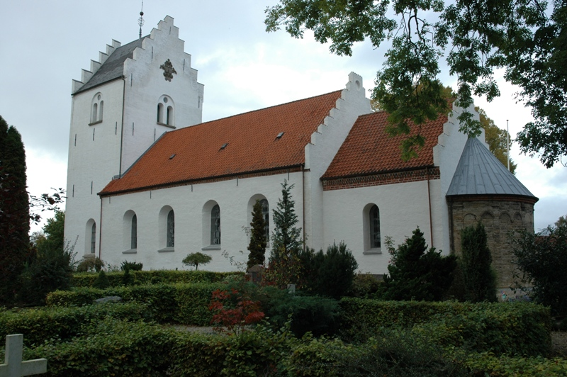 Skibby Kirke, Skibby sogn, Horns herred, Frederiksborg Amt